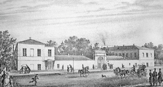 Рішельєвський ліцей до перебудови 1975 р. для Вільяма Вагнера, Дерибасівська вул., 16